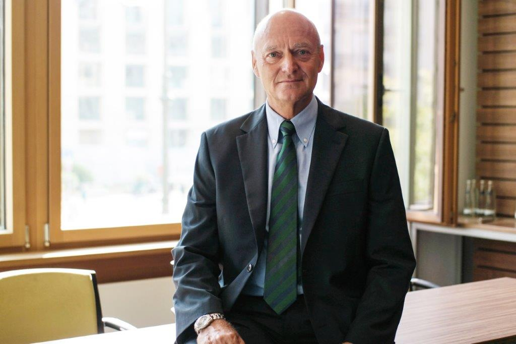 Gerhard Schindler, 2018, in Berlin (Catrin Schmitt)